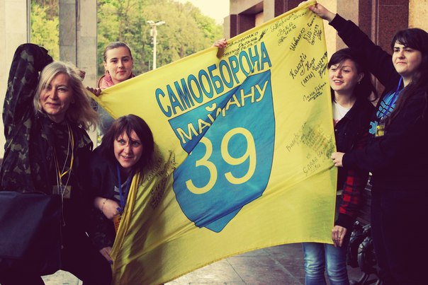 члени жіночої сотні зі стягом